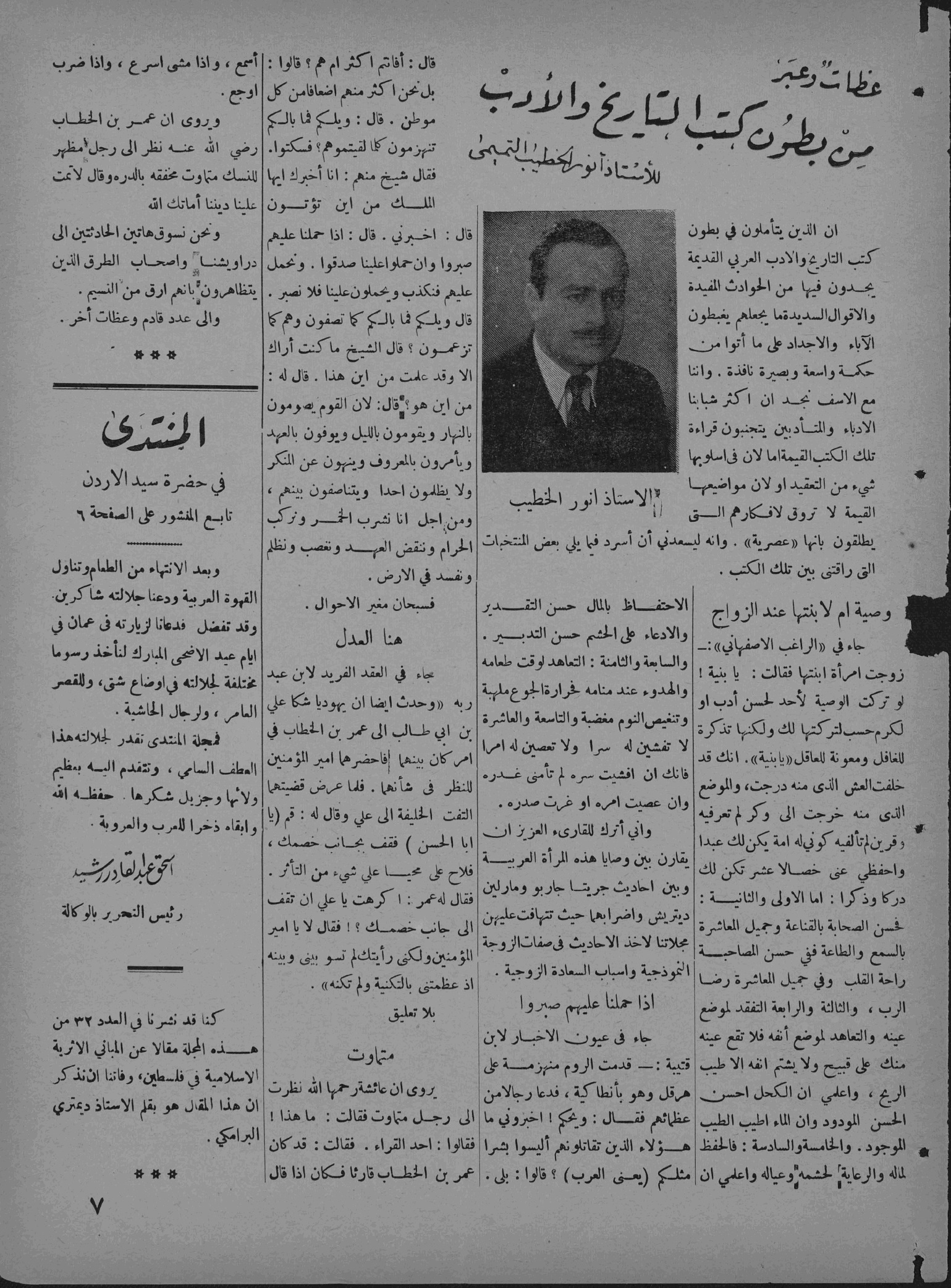 مقال لأنور الخطيب في صحيفة المنتدى الجمعة, تشرين الثاني 08, 1946